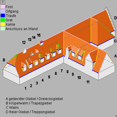 Dachgauben, Dachkanten und Dachflächen mit deutschen Text 1 Giebelgaube 2 Schleppgaube 3 Flachdachgaube 4 Walmgaube mit First 5 Gaube mit Bogendach 6 Walmgaube 7 Gaube mit zeltdachförmigem Dachaufbau 8 Lukarne 9 schräge Schleppgaube 10 liegende Schleppgaube 11 Zwerchdach mit Satteldach und gedecktem Dreiecksgiebel 12 einseitiger Dachreiter 13 Fledermausgaube 14 Dreiecksgaube 15 Dachreiter A gedeckter Dreiecksgiebel B gedeckter Trapezgiebel mit Krüppelwalm C Walm D freier Giebel / Treppengiebel